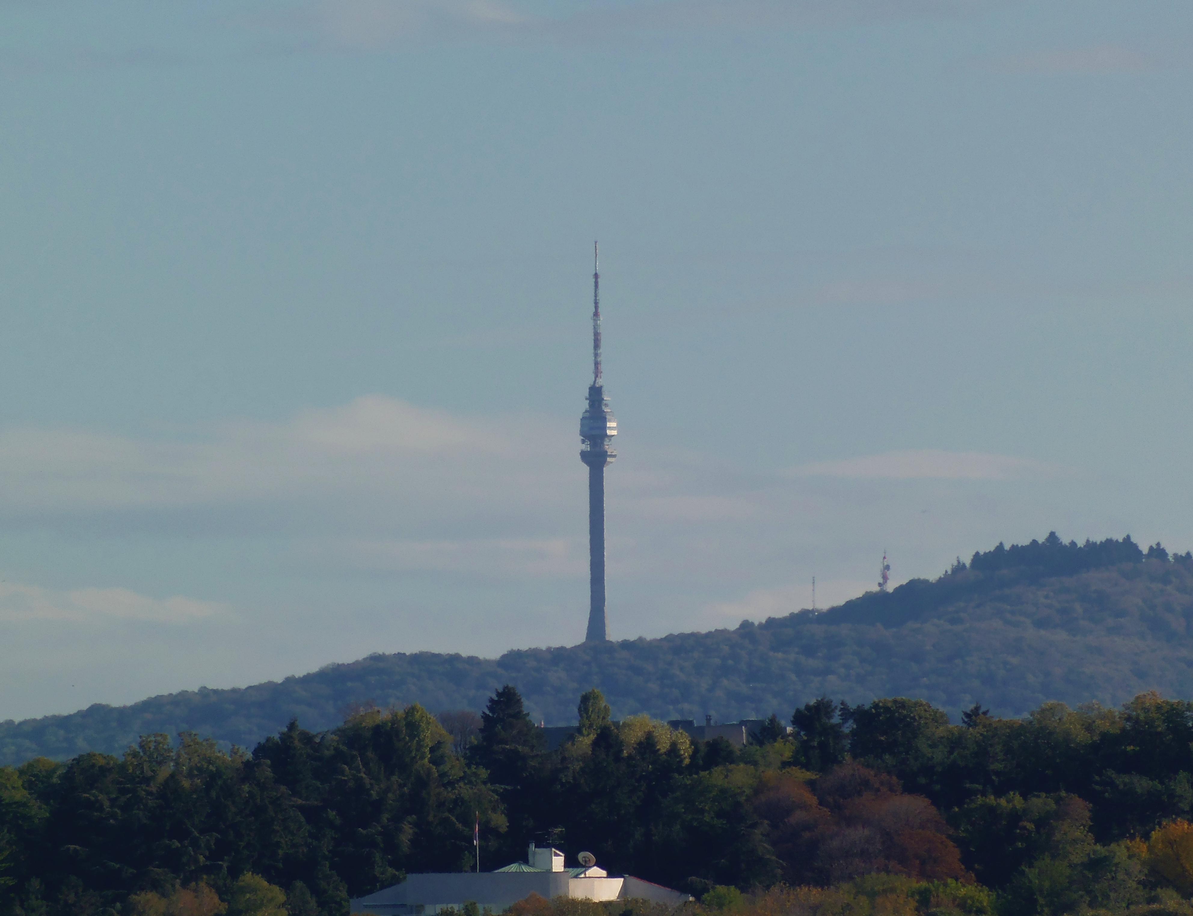 Торањ на Авали, 15. октобра 2012.